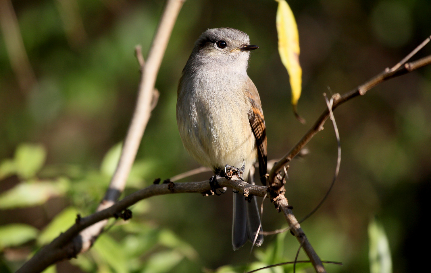 Viudita (Colorhamphus parvirostris). Mayo, 2015. Empedrado, VII Region, Chile. Foto Ignacio Azocar